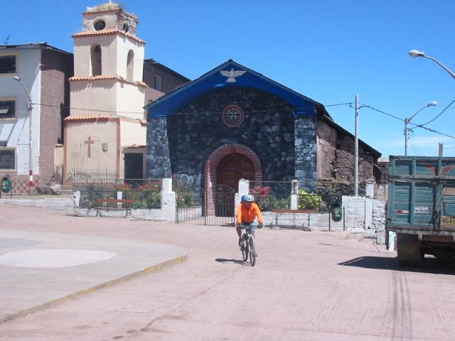 distrito de lachaqi